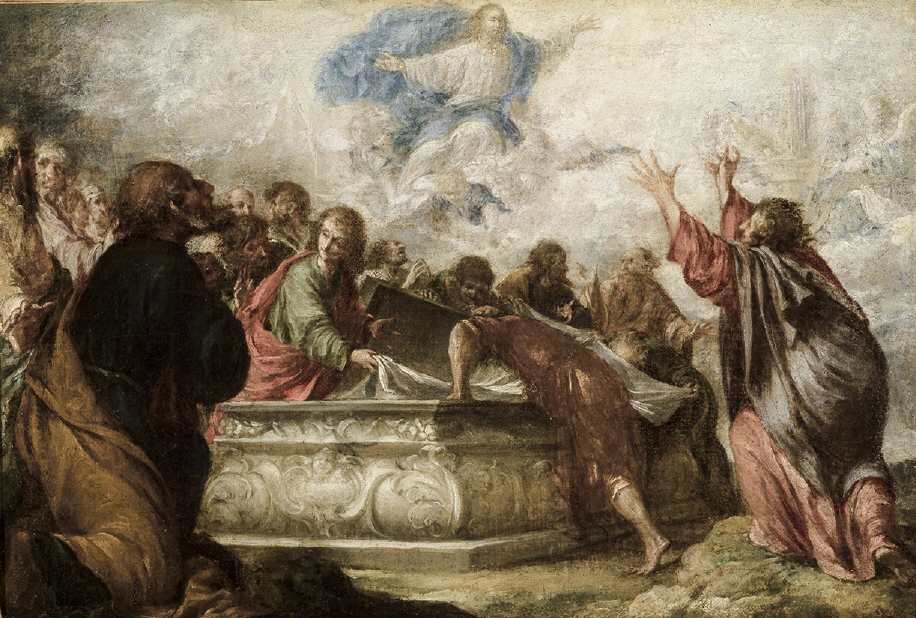 La obra representa la asunción a los cielos de la Virgen María, madre de Jesucristo.